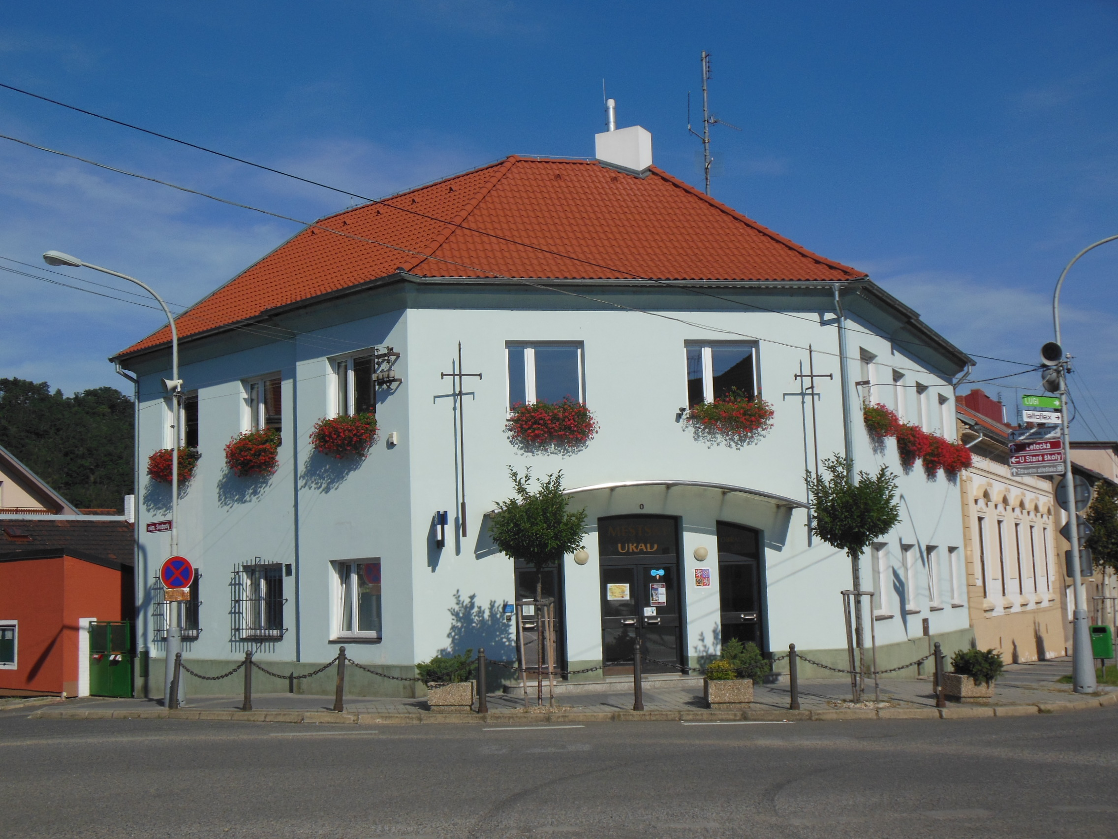 Radnice městského úřadu na náměstí Svobody v Libčicích nad Vltavou (okr. Praha-západ)